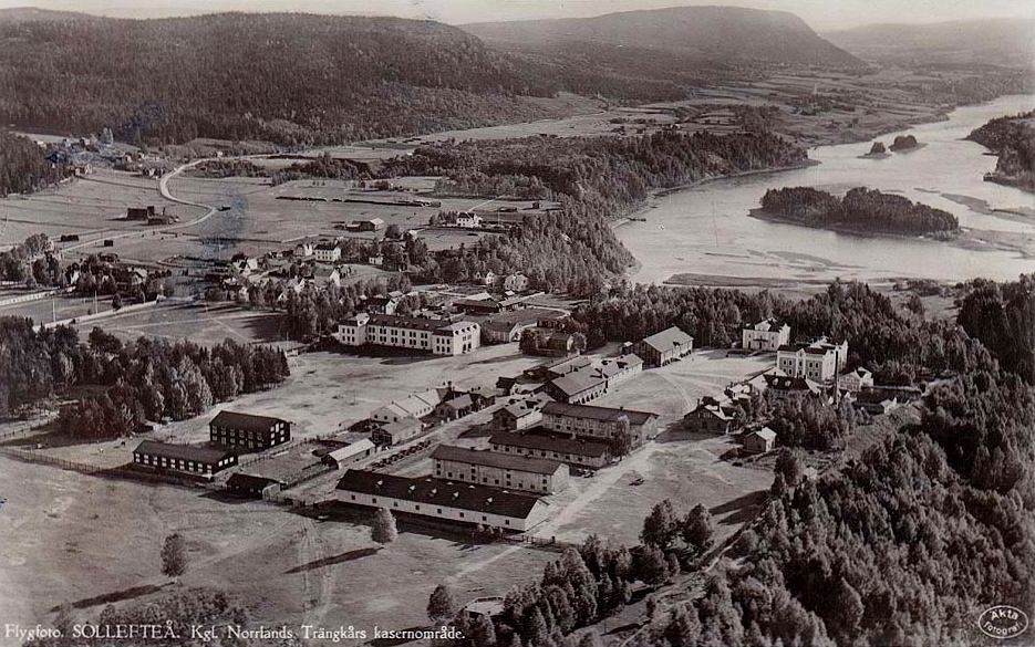 Flygfoto över Norrlands trängkårs kasernetablissement i Sollefteå.